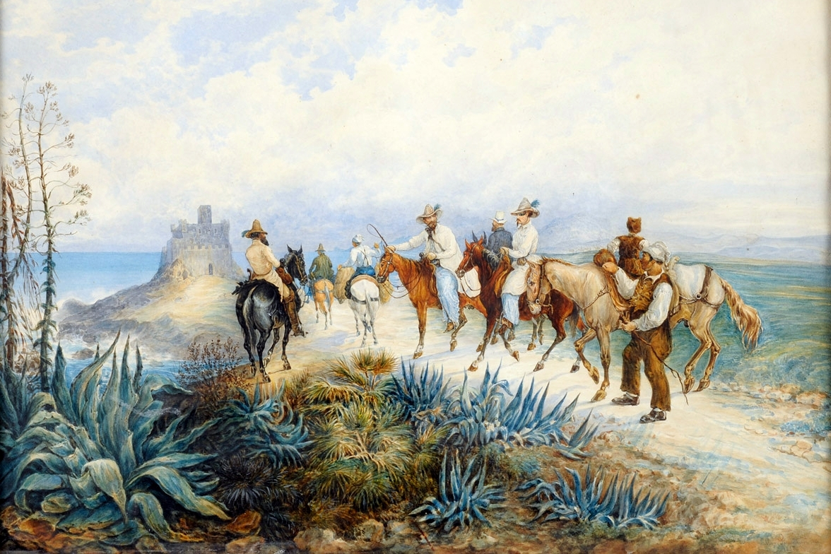 Reiter vor einem Castellotitle QS:P1476,de:"Reiter vor einem Castello" label QS:Lde,"Reiter vor einem Castello"